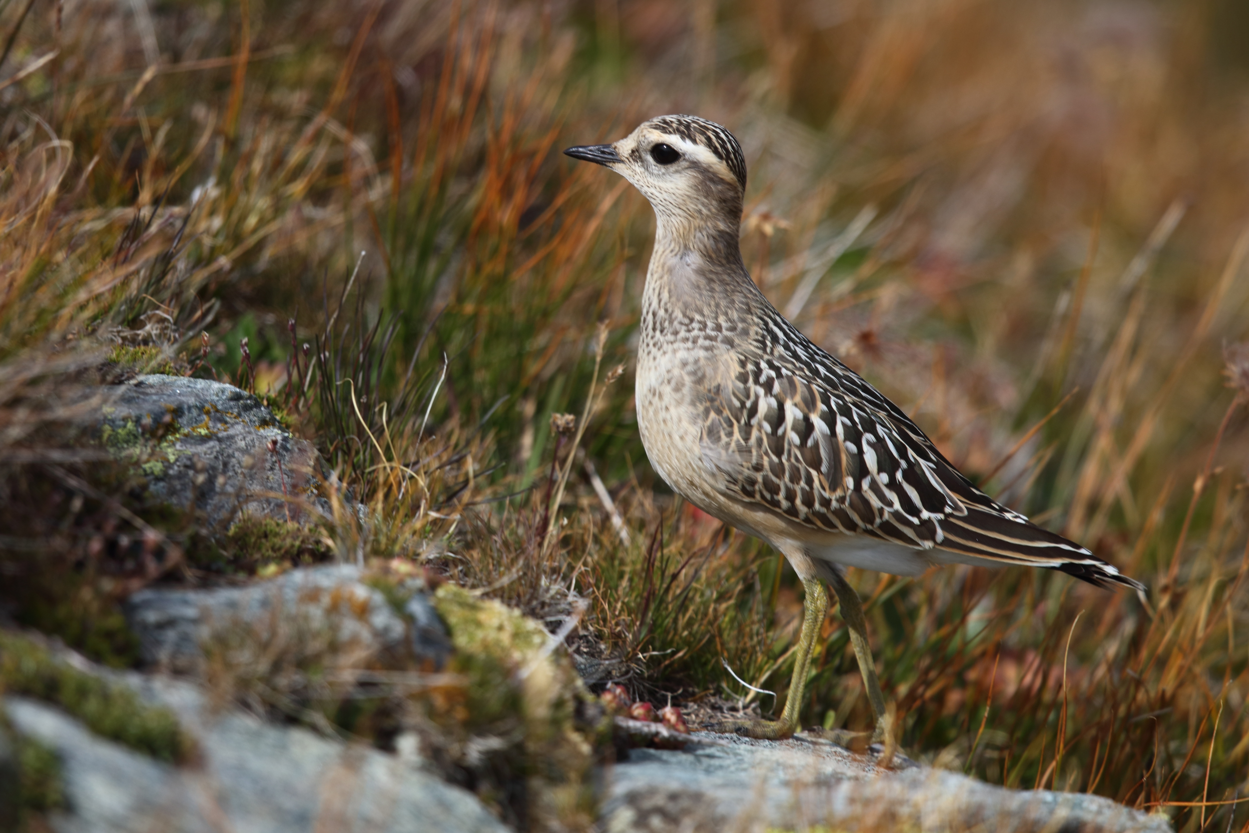 Parco nazionale del Gran Paradiso (Q847690)